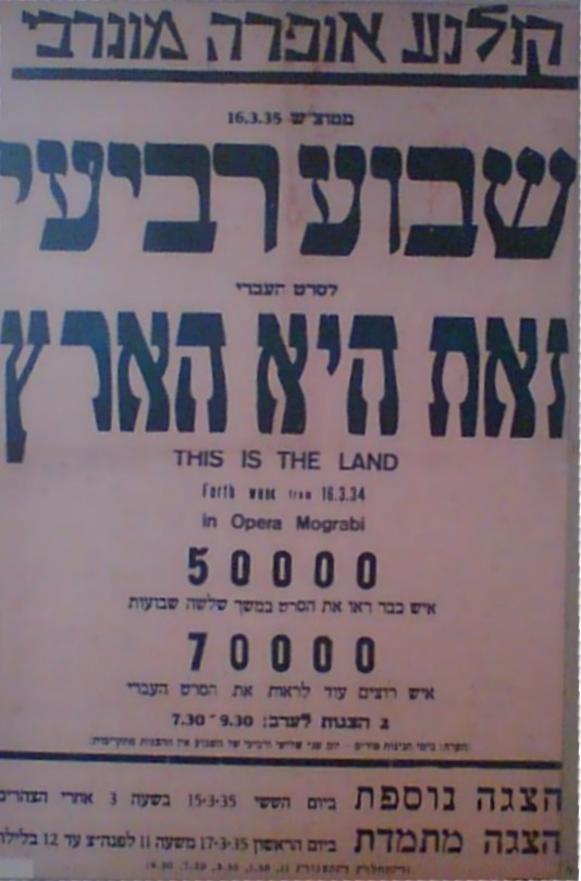 כרזת הסרט "זאת היא הארץ". צילם דוד שי בסינמטק תל אביב.